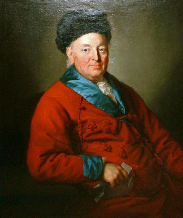 Christian Gottlob Frege (1715-1781) auf einem Ölgemälde von Anton Graff